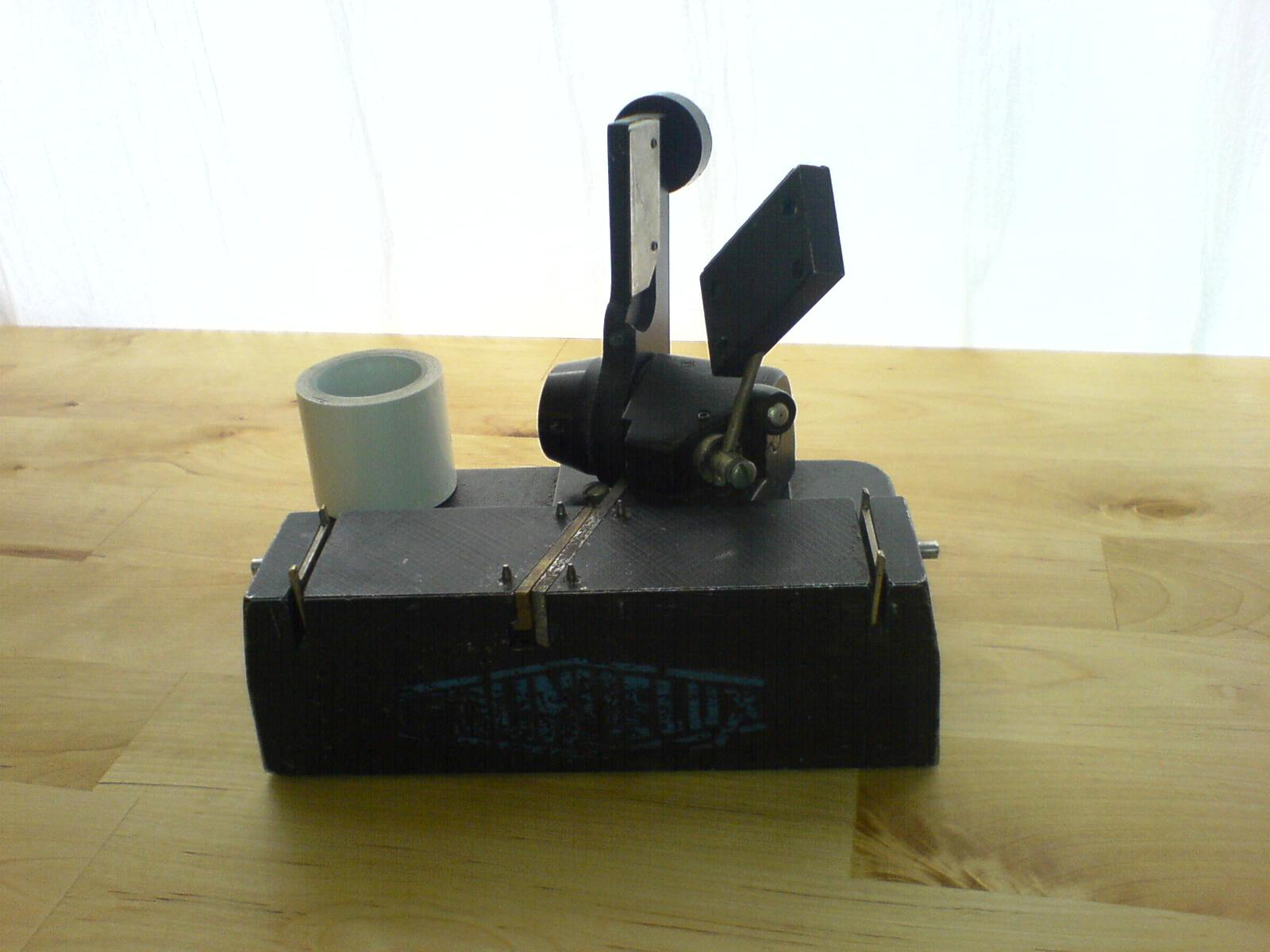 Schrägschnitt-Stumpfklebelehre nach Carlos Rivas